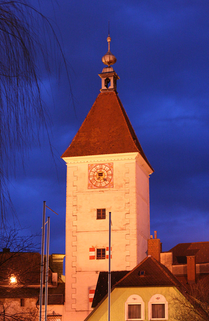 Der Welser Ledererturm aufgenommen zu "Blauen Stunde" / Wels' landmark, the Lederer-Tower, shot at the "Blue Hour".